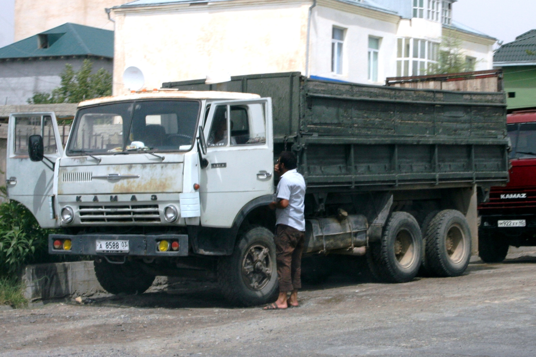 Landwirtschaftlicher Kipper KamAZ-55102 in Tadschikistan.